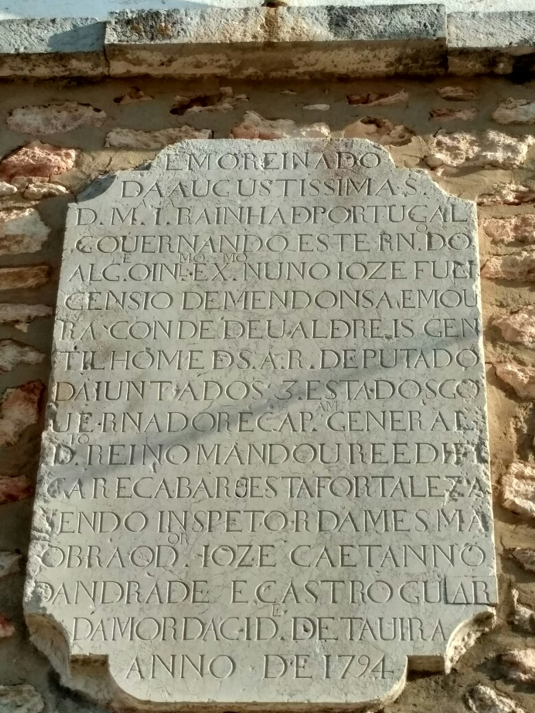 Lápide da entrada da Fortaleza de Cacela, datada de 1794, fazendo referência à reedificação de que foi alvo por aquela altura.